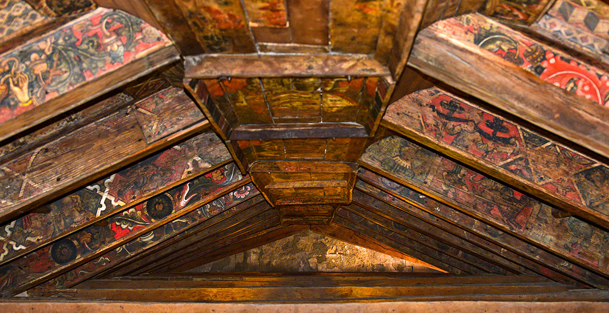 Foto d'insieme del tetto ligneo a capriate dipinte della Cattedrale di Nicosia